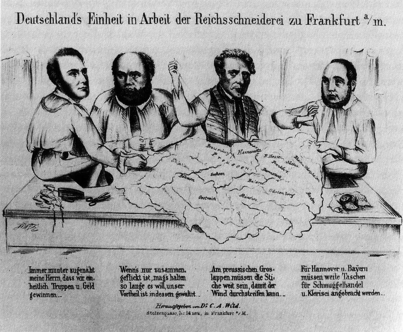 Karikatur der Verfassungsarbeit der Frankfurter Nationalversammlung, von links Heinrich von Gagern, Alexander von Soiron, Carl Theodor Welcker, Friedrich Daniel Bassermann